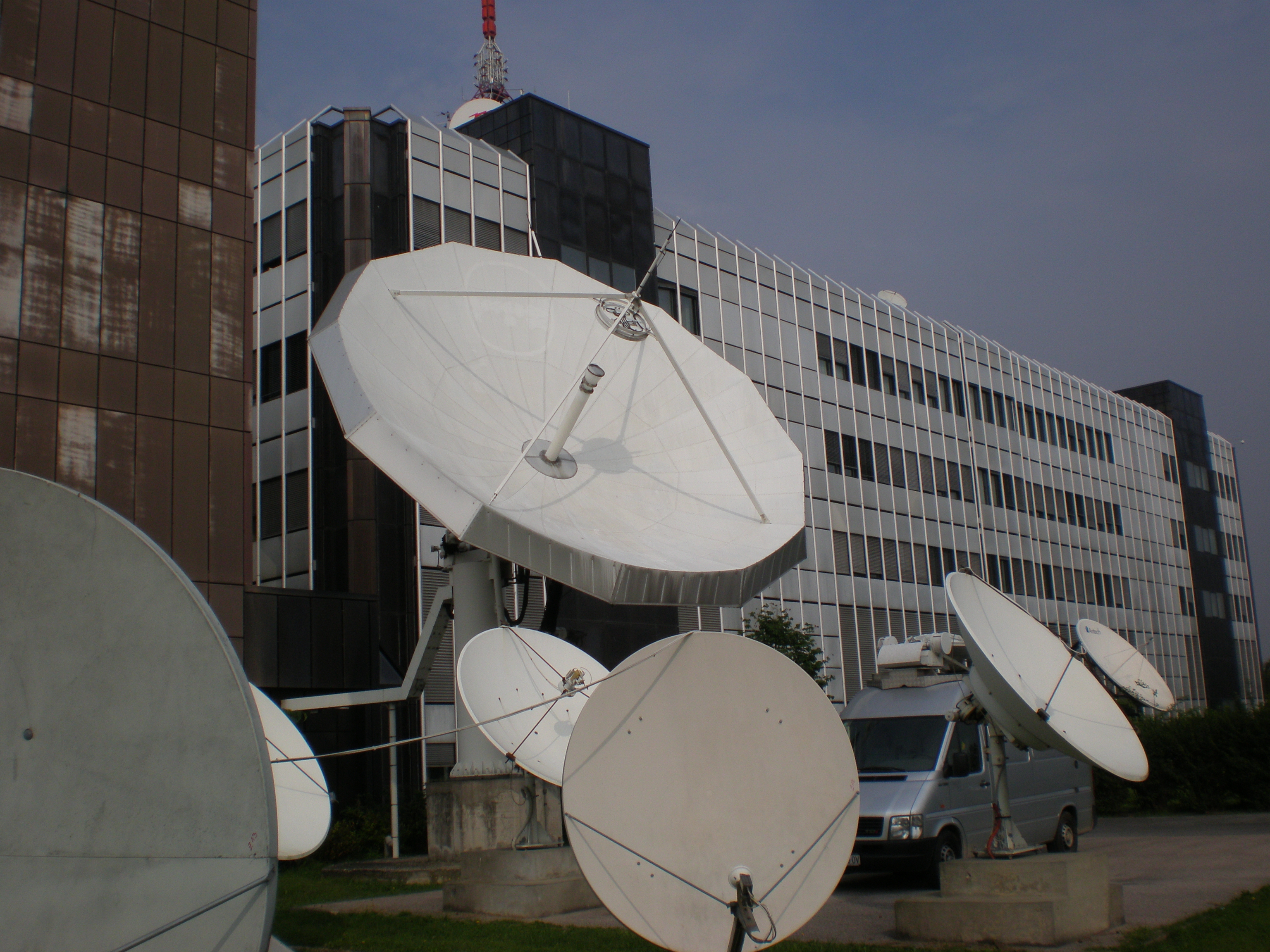 Prisavlje-HRT